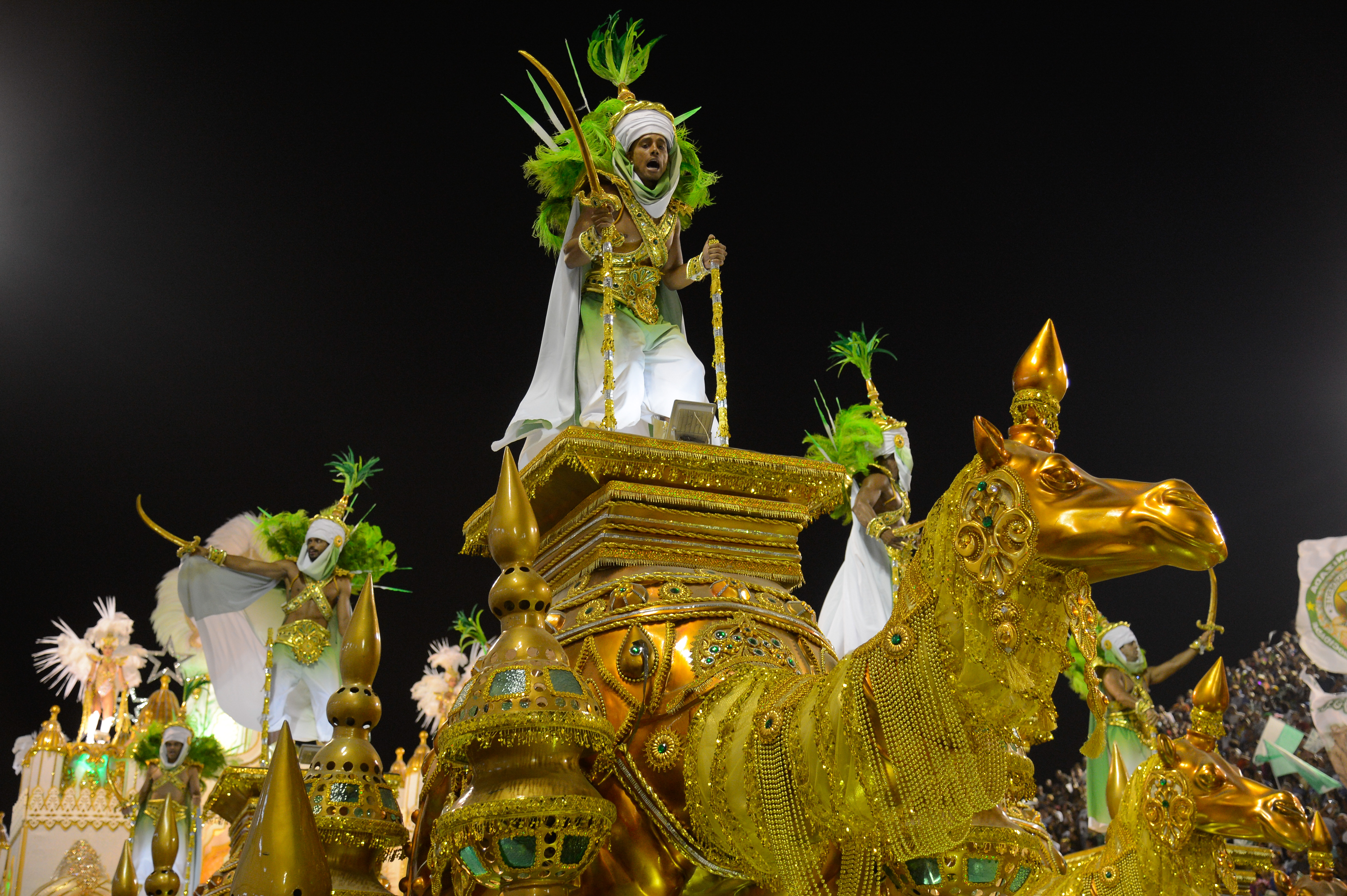 Rio de Janeiro - Desfile da escola de samba Mocidade Independente de Padre Miguel, pelo grupo especial, no Sambódromo (Fernando Frazão/Agência Brasil)